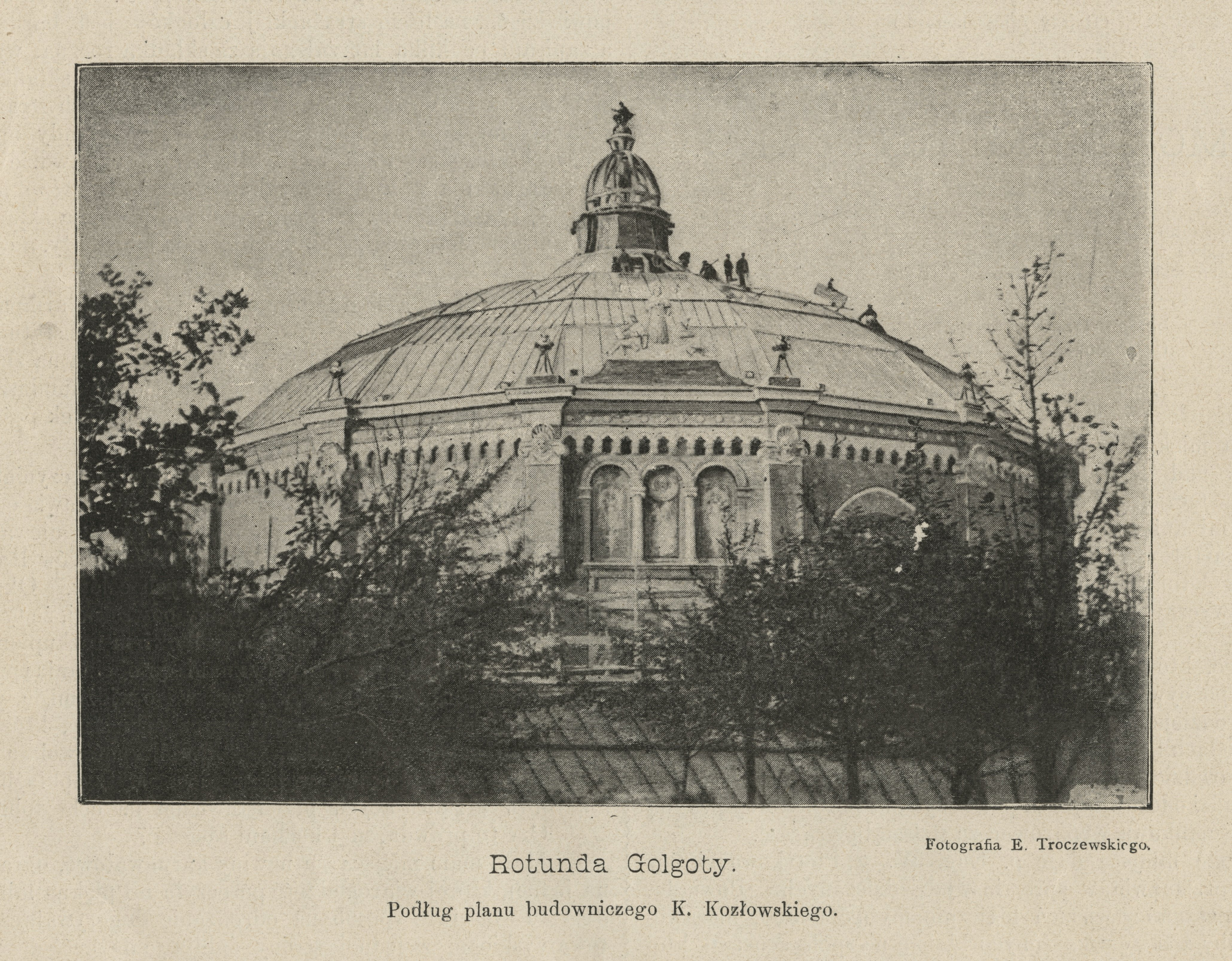 Rotunda Golgoty ul. Karowa w Warszawie